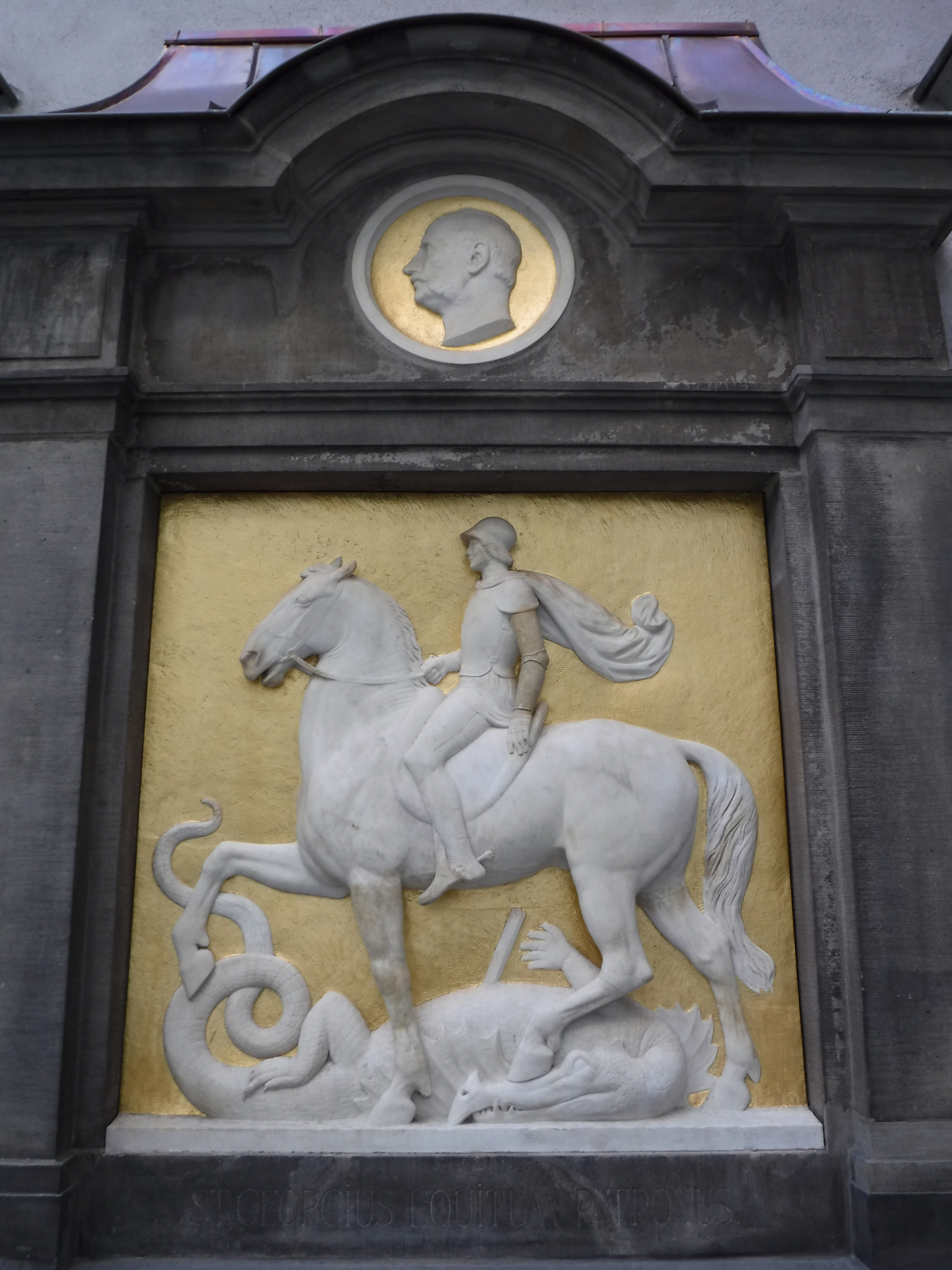 Georgsbrunnen (Dresden) - Georgs-Relief und Porträt Georg von Sachsens